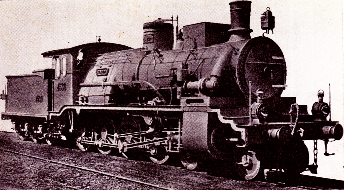 Locomotiva 4530 della Rete Mediterranea, poi FS Gr. 750